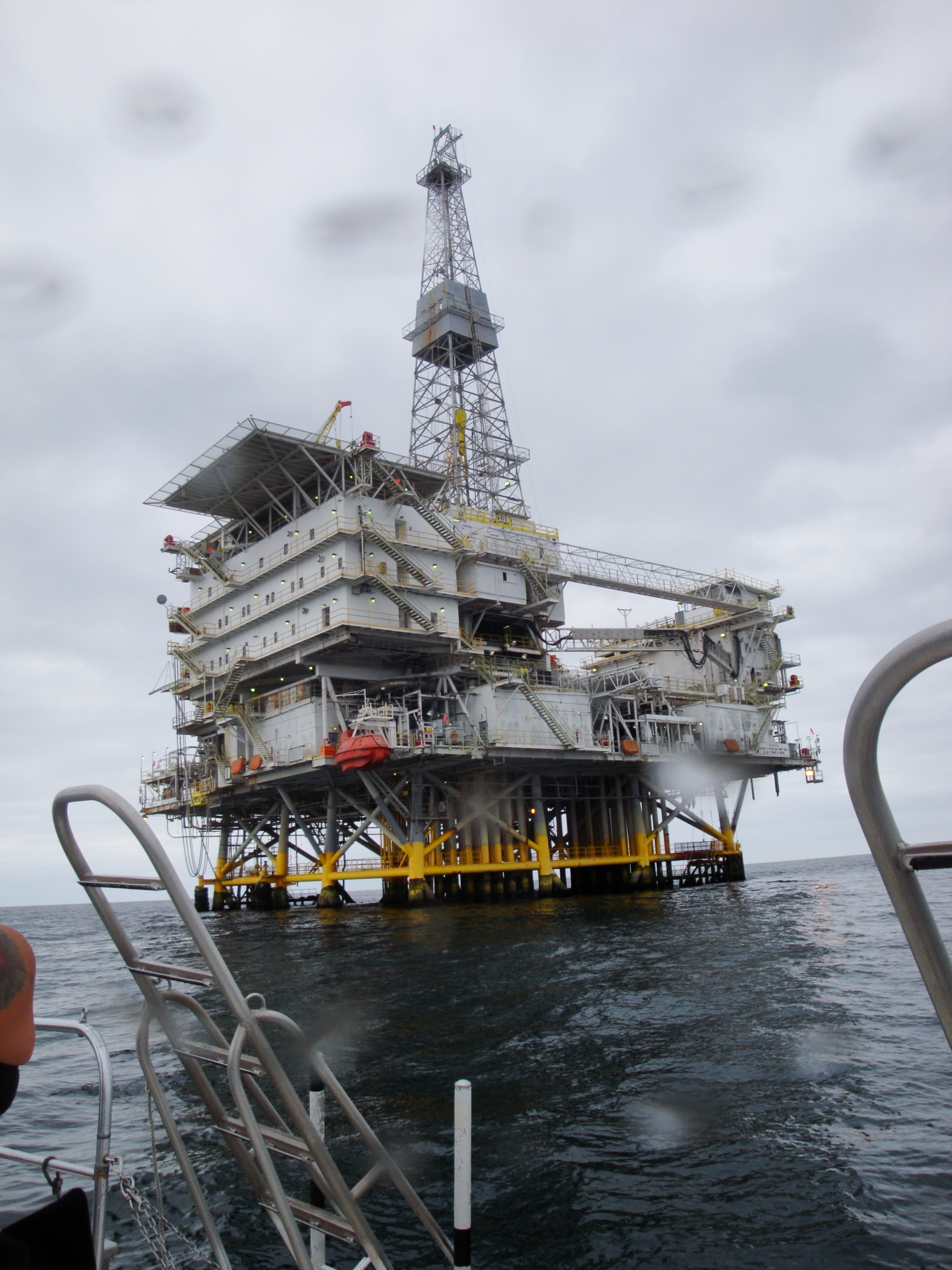 Oil Rig Eureka